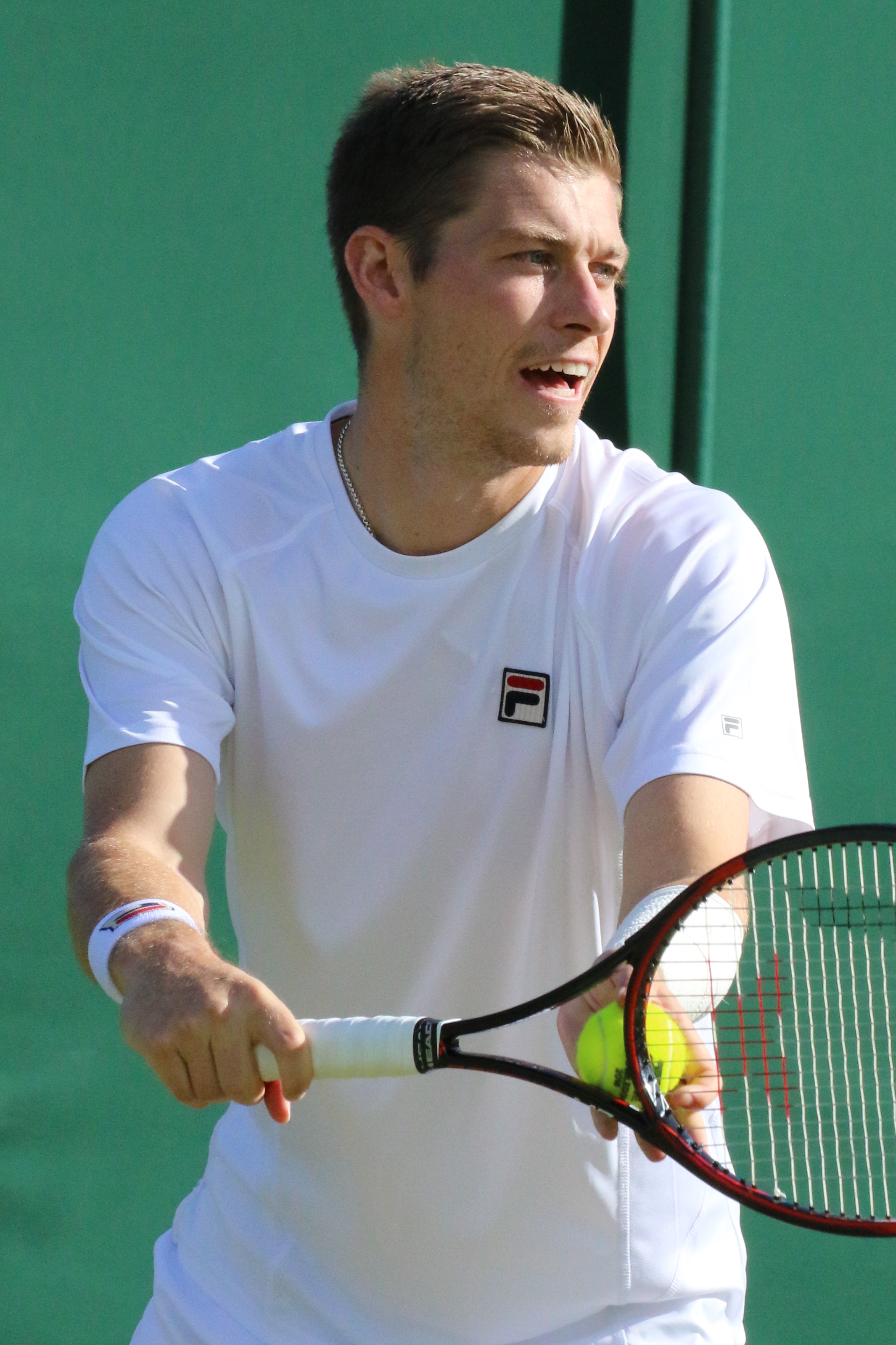 Skupski N. WM16 (9)